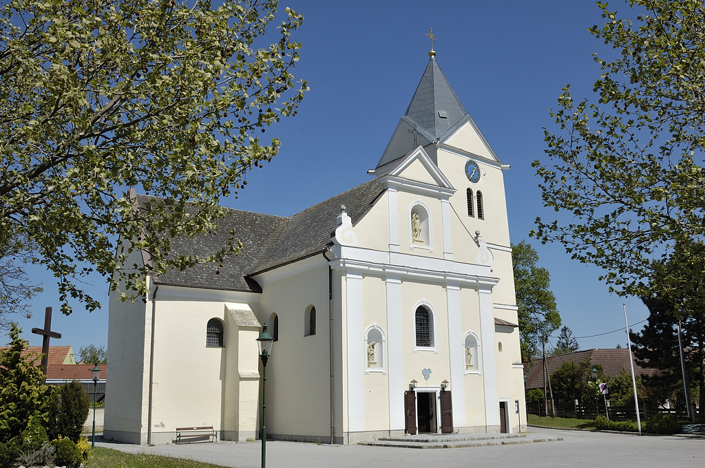 Kath. Pfarrkirche Mariae Himmelfahrt